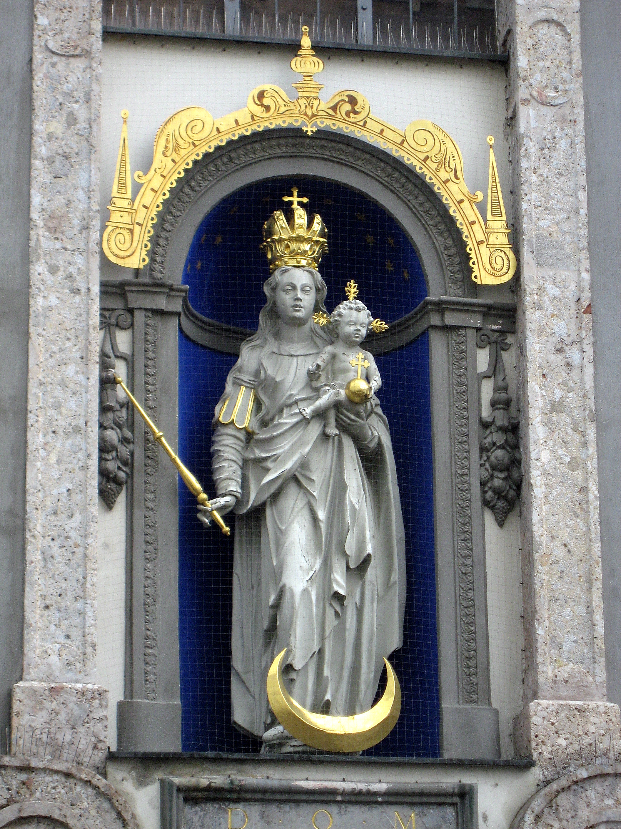 Hall in Tirol, Jesuitenkirche am Stiftsplatz, 1571 von Erzherzogin Magdalena zur geistlichen Betreuung des benachbarten Damenstifts gegründet, 1608 erbaut nach de Vorbld der Jesuitenkirche in Konstanz, 1610 geweiht, später im Stil des Barock umgebaut, arienfigur in der Fassade über dem Portal